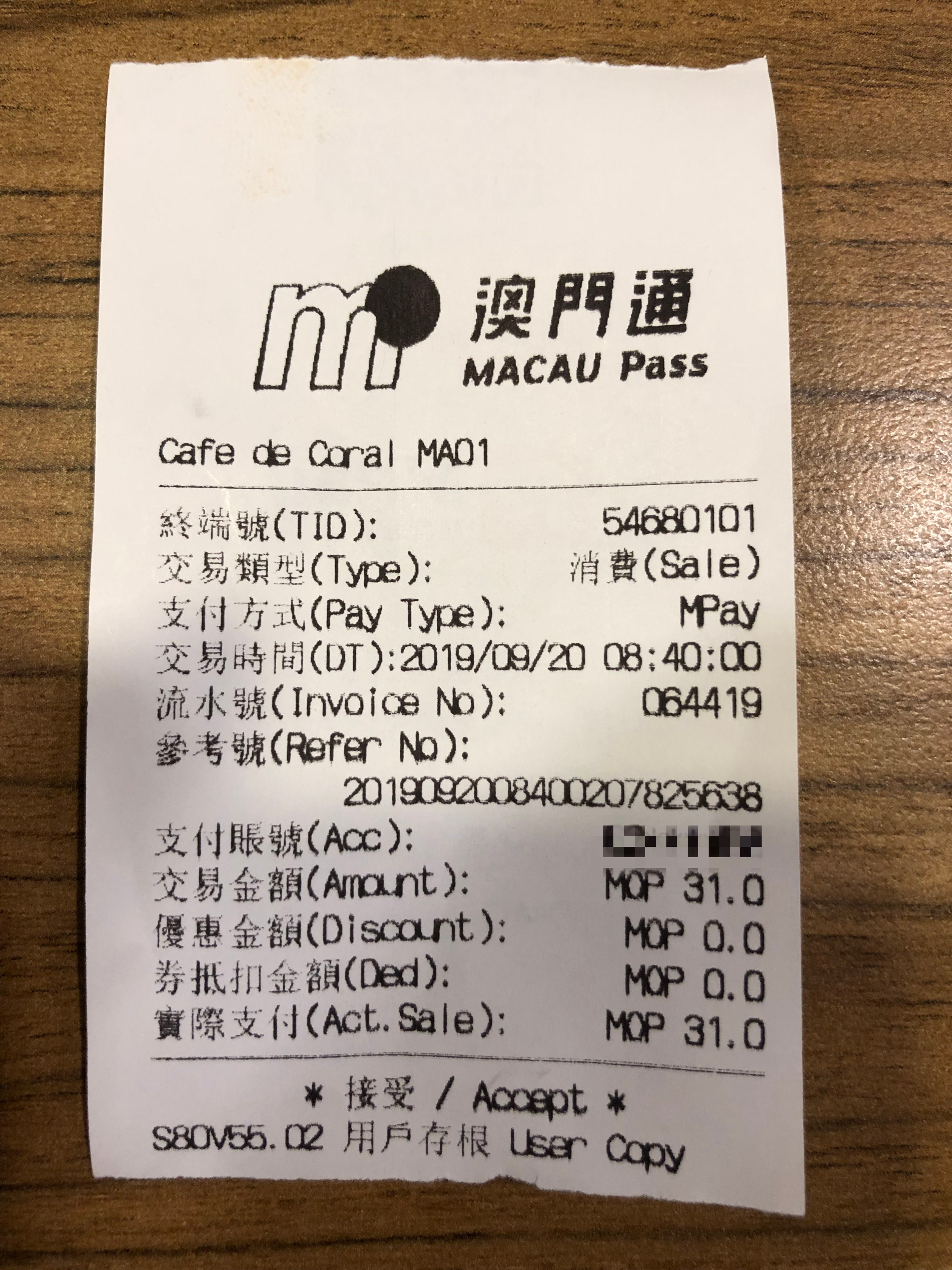 在澳門通服務供應商使用澳門錢包，消費後的交易憑證。